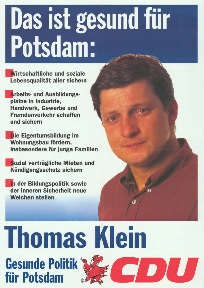 Das ist gesund für Potsdam: . Wirtschaftliche und soziale Lebensqualität aller sichern . Arbeits- und Ausbildungsplätze in Industrie Handel, Gewerbe und Frendenverkehr schaffen und sichern . Die Eigentumsbildung im Wohnungsbau fördern, insbesondere für junge Familien . Sozial verträgliche Mieten und Kündigungsschutz sichern . In der Bildungspolitik sowie der inneren Sicherheit neue Weichen stellen Thomas Klein Gesunde Politik für Potsdam CDU Abbildung: Porträtfoto Plakatart: Kandidaten-/Personenplakat mit Porträt Objekt-Signatur: 10-033 : 220 Bestand: Landtagswahlplakate Brandenburg (10-033) GliederungBestand10-18: Landtagswahlplakate Brandenburg (10-033) » CDU Lizenz: KAS/ACDP 10-033 : 220 CC-BY-SA 3.0 DE